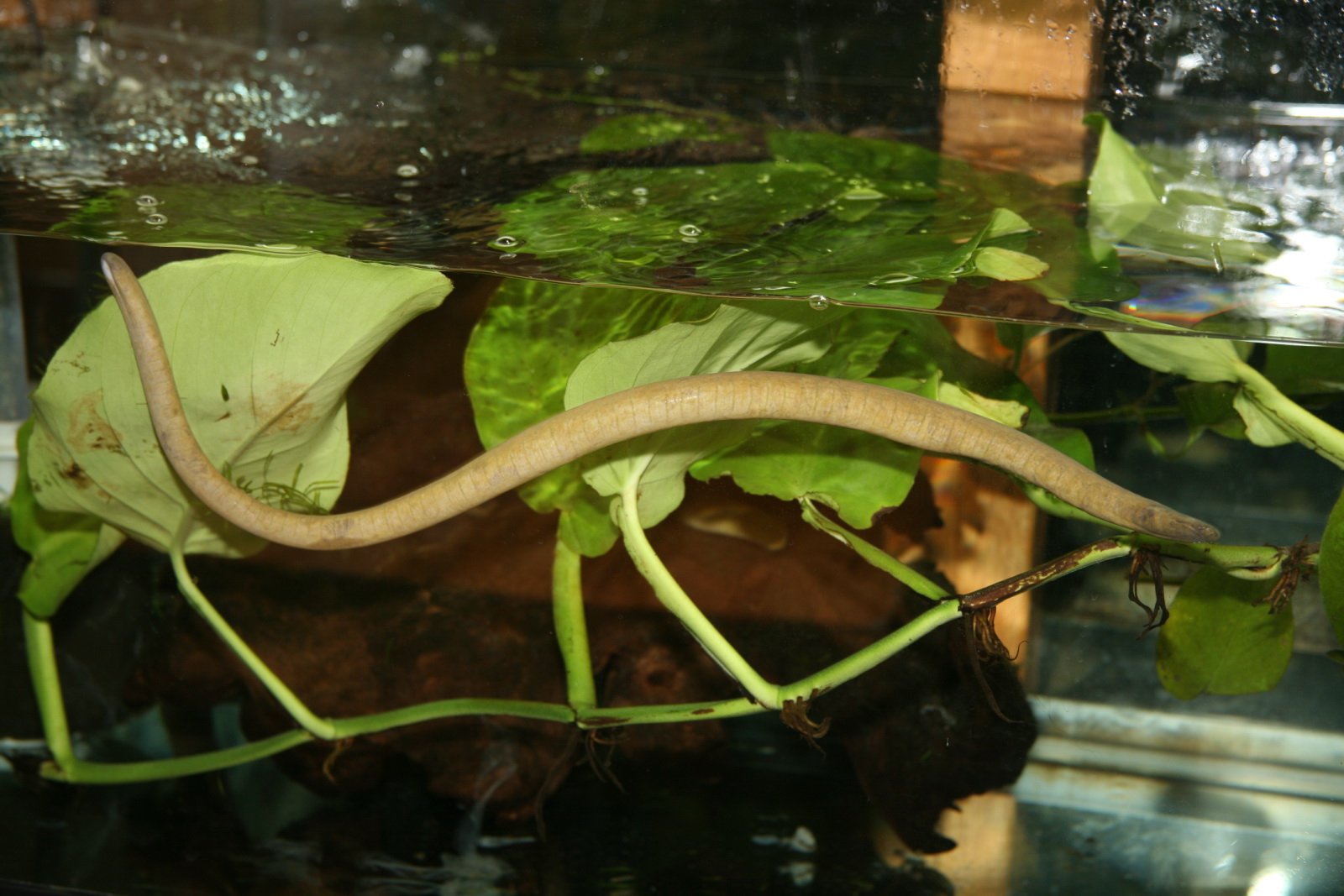 Aquatic Caecilian (Typhlonectes natans)